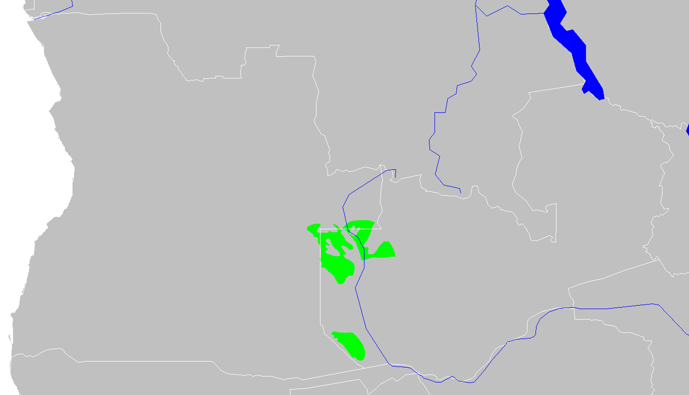 Western Zambezian grasslands ecoregion map